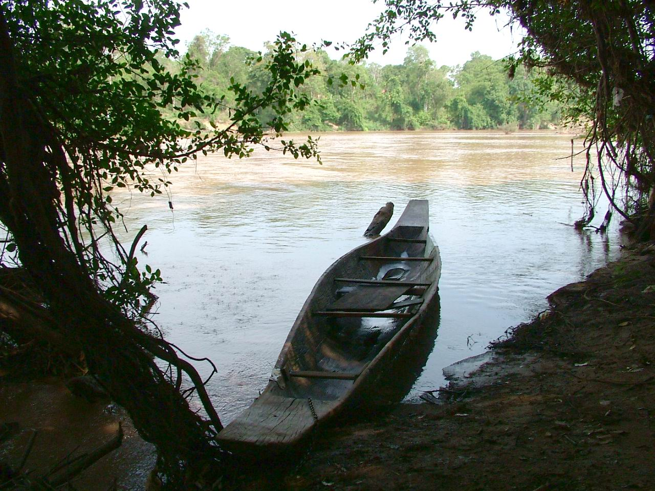 Thuyền độc mộc của người Ê Đê trên sông Serepôk đoạn qua Bản Đôn Việt Nam